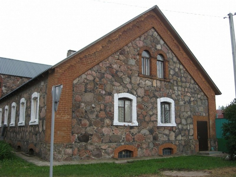 Алесіна. Бровар